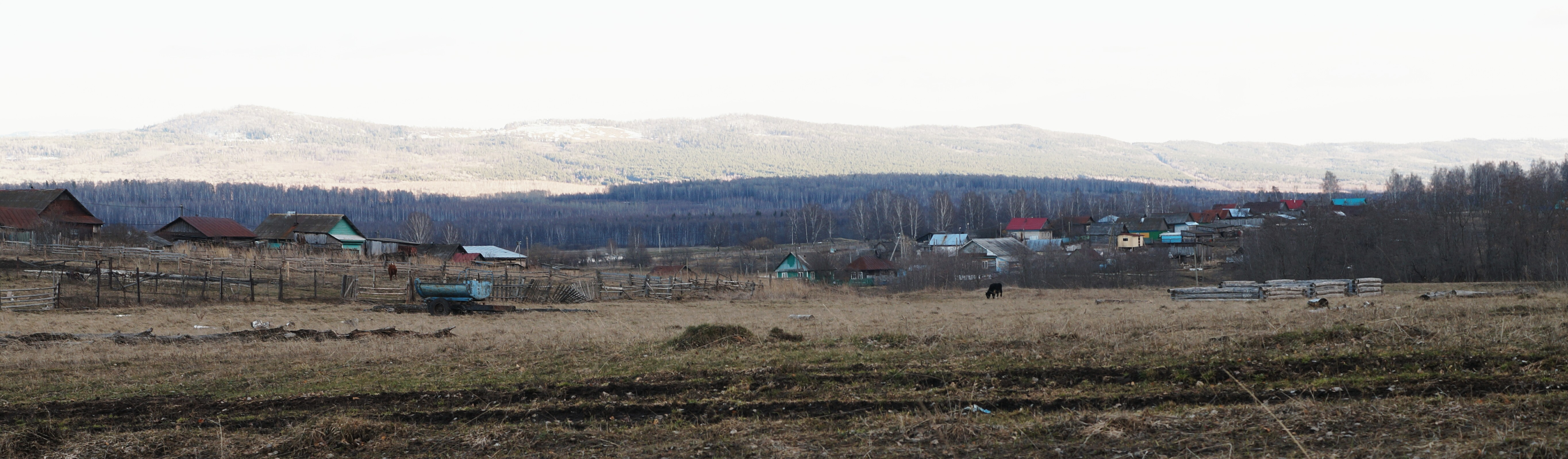 Карагулово на фоне хребта Аркатау